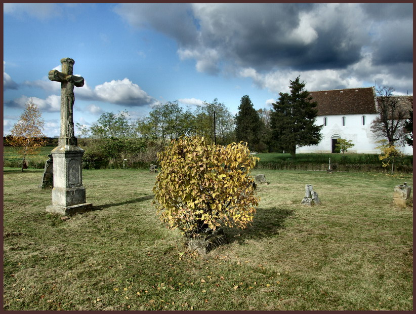 Árpádkori templom Szenyérnél